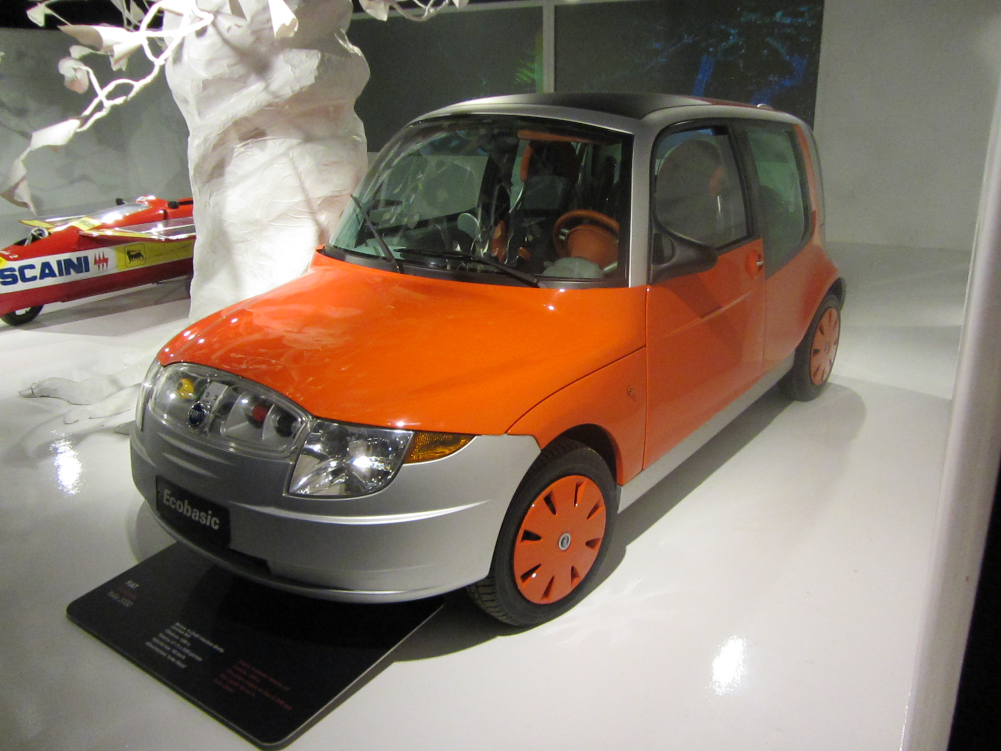 Museo Nazionale dell'Automobile di torino, concept eco friendly area. Modelli Fiat e Phoenix. nella foto Fiat Ecobasic, Italia 2000, motore 4 cilindri a iniezione diretta common rail. Cilindrata 1200cc 61CV a 3500giri. Vel Max: 160km/h alimentazione: Turbo Diesel